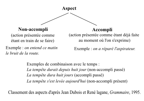 Classification_des_aspects,_d'après_Jean_Dubois_et_René_Lagane, agrégés de grammaire, dans Grammaire, Larousse-Bordas, 1995, ISBN 2 03 800122 7